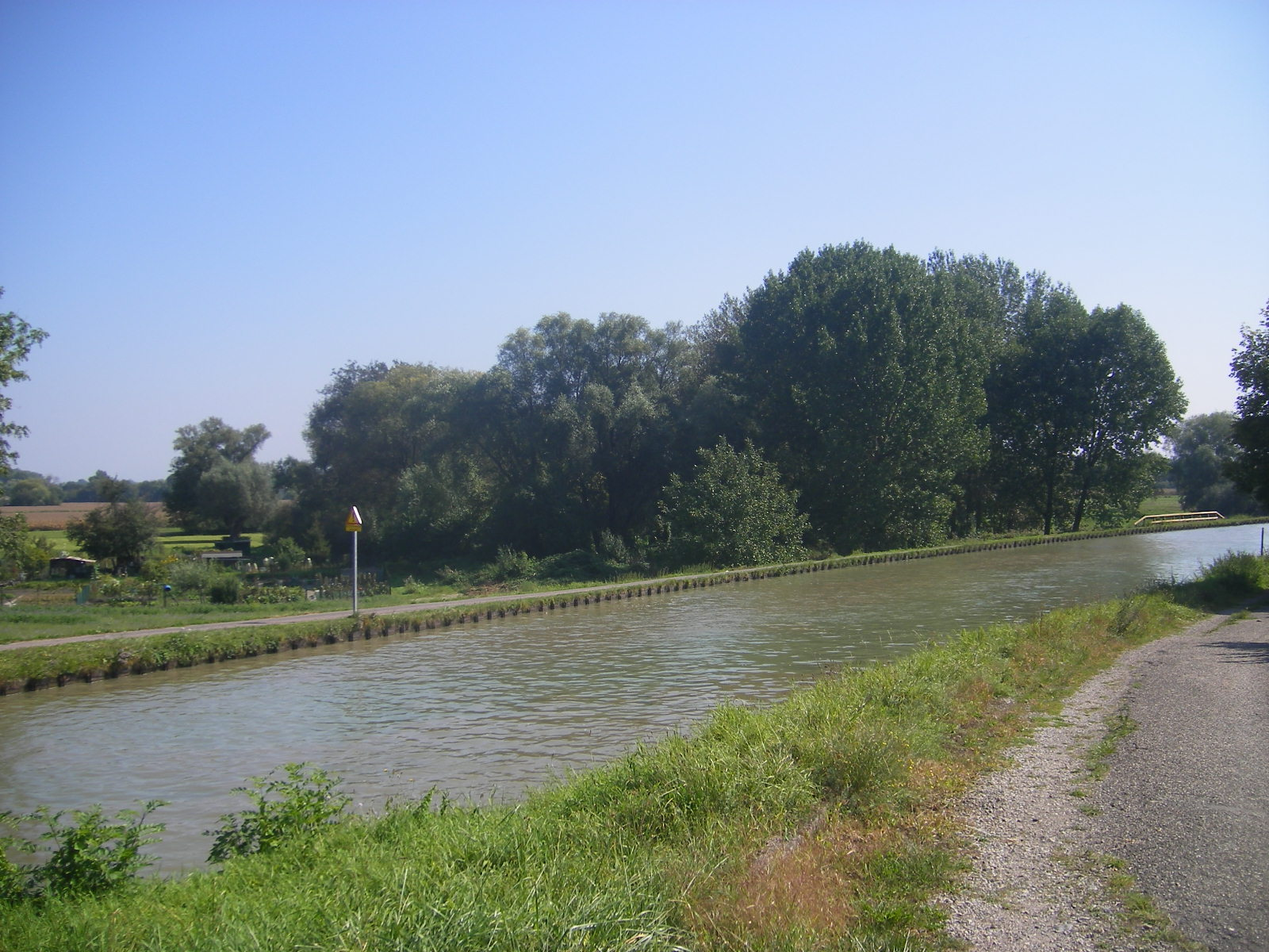 Marne-Rhine Canal between Reichstett and Souffelweyersheim